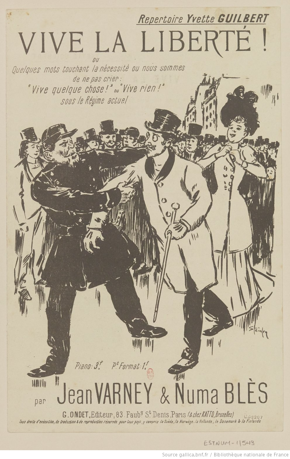 Vive la liberté, chanson de Numa Blès, musique de Jean Varney, illustration de 1899 par Théophile Alexandre Steinlen.